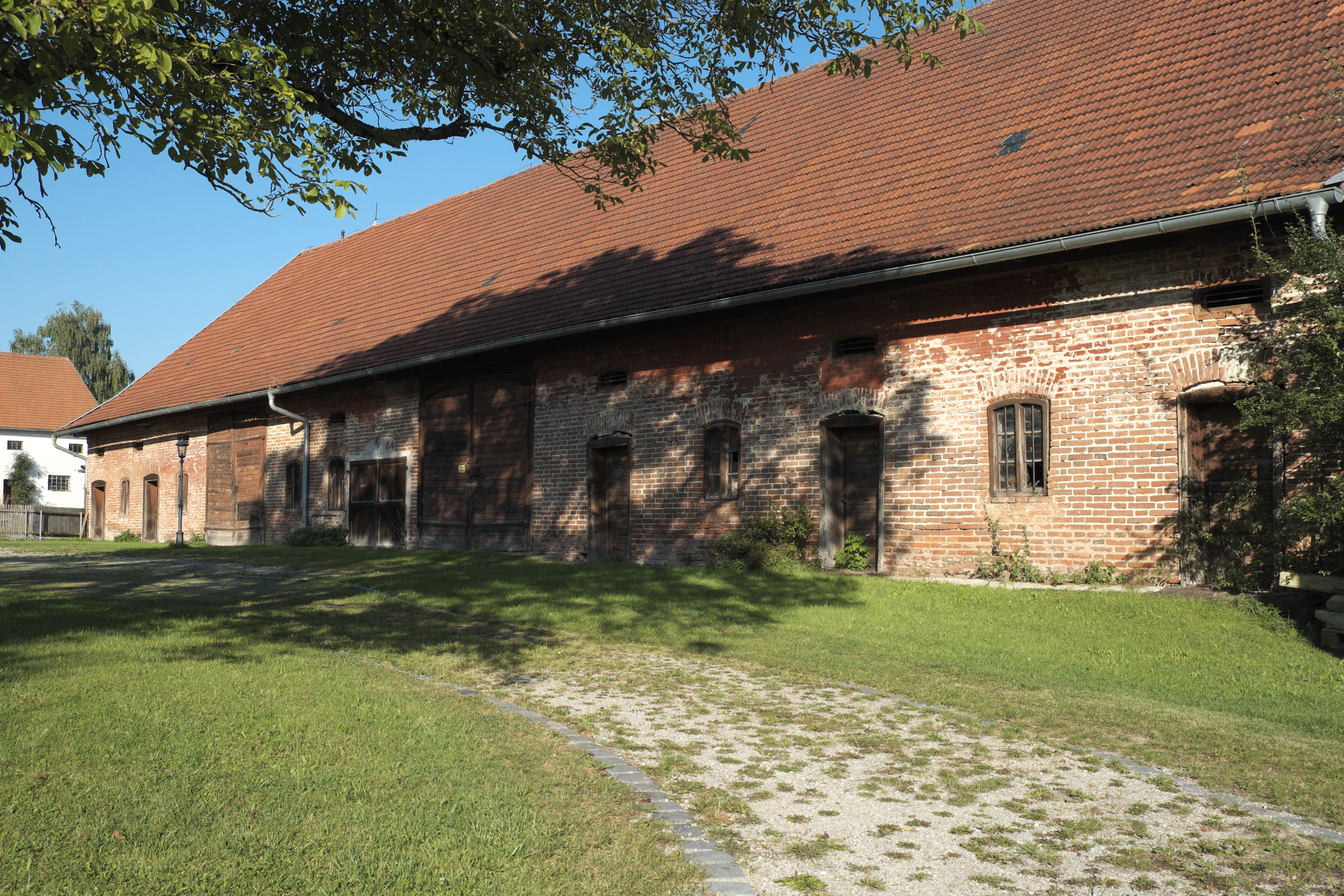 Ehemaliges Pfarrhaus in Dünzelbach (Moorenweis) im Landkreis Fürstenfeldbruck (Bayern/Deutschland), Pfarrstadel